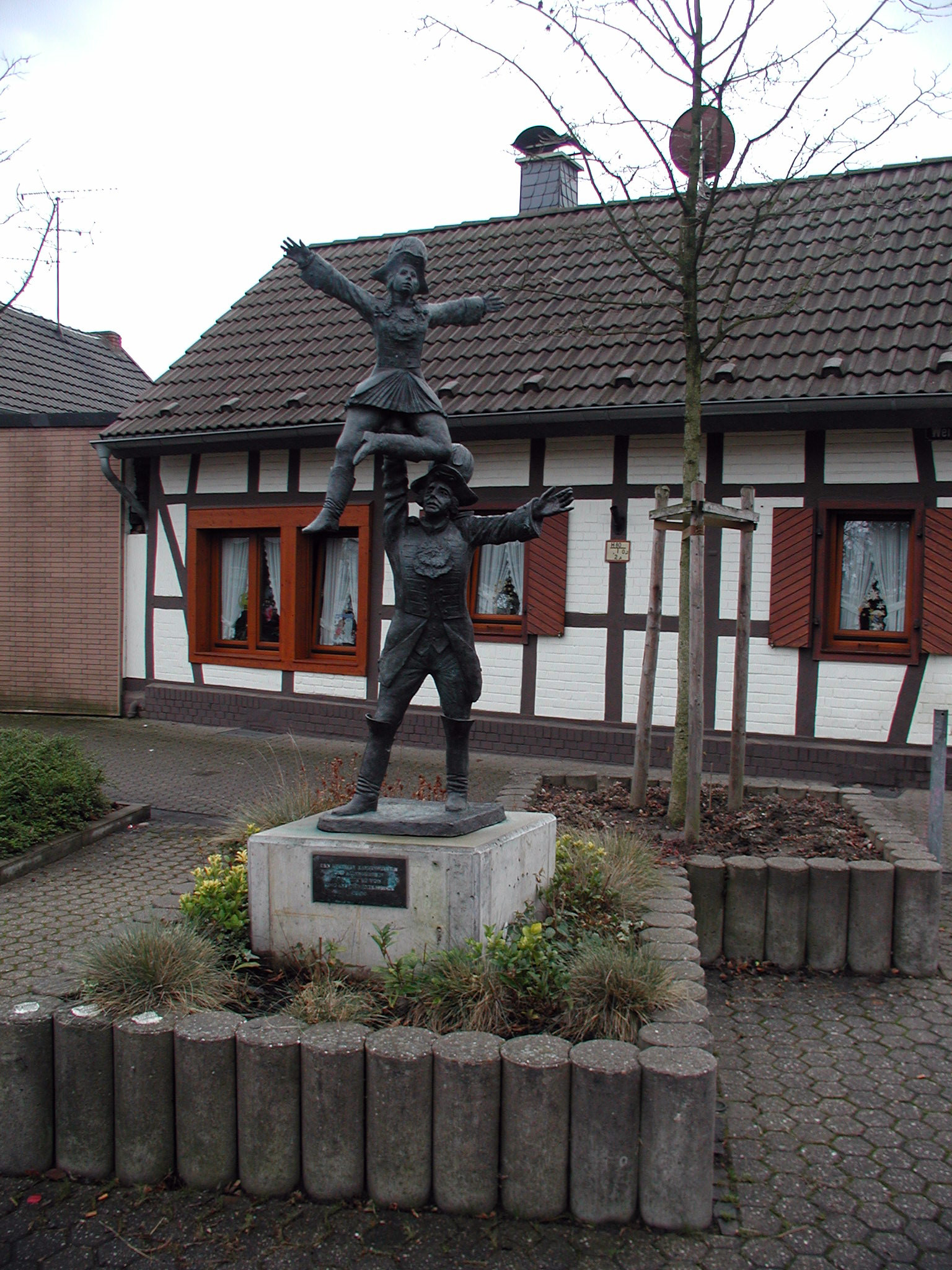 Alt-Hürth, Hürther Funkentanz